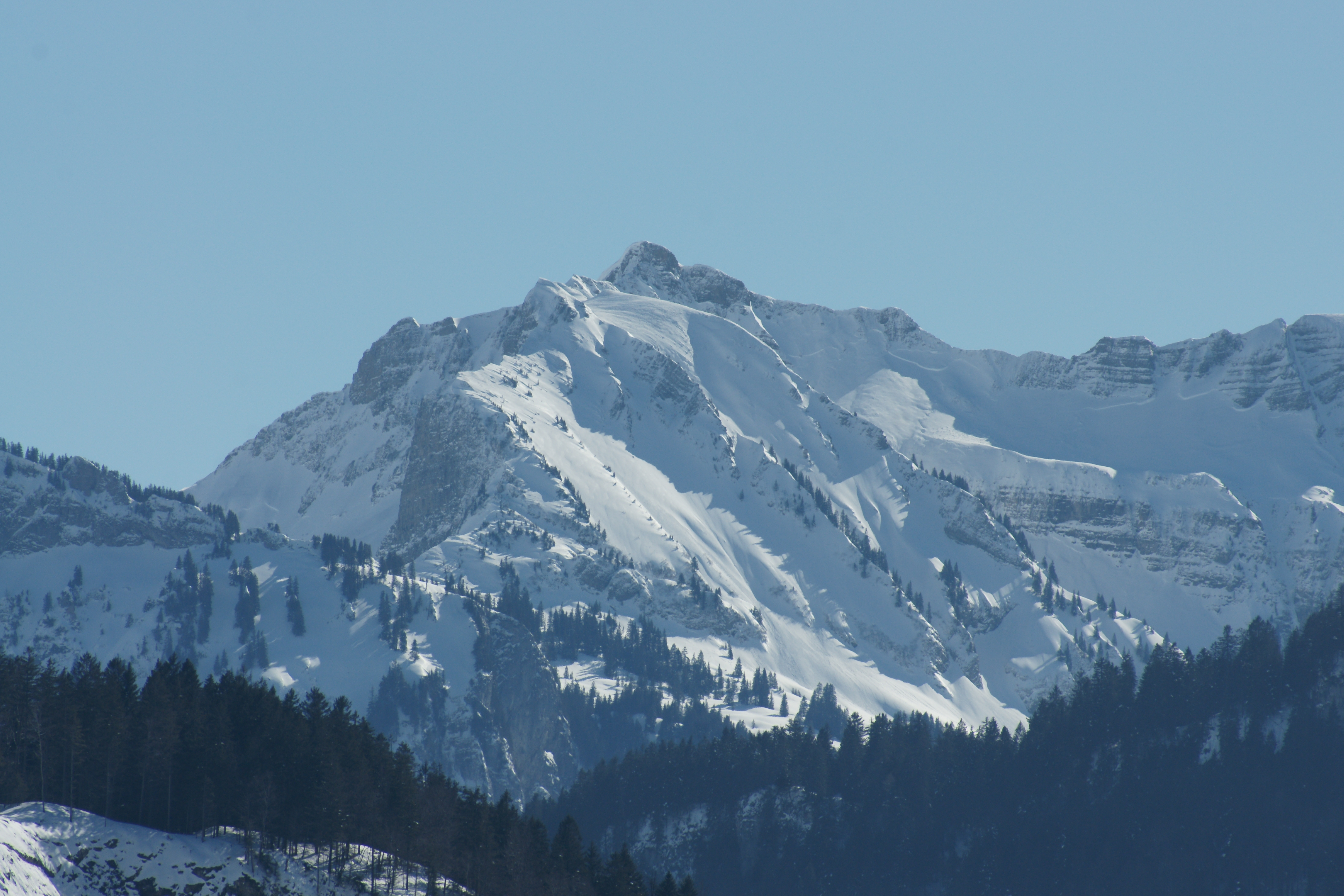 Der Klippern 2.066m, von Mellau fotografiert, liegt im Bregenzerwaldgebirge zwischen der Kanisfluh und der Damülser Mittagsspitze.